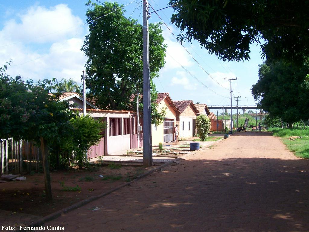 Uma bucólica rua de Aguiarnópolis-TO, ao fundo a ponte Juscelino Kubstichec sobre o rio Tocantins.